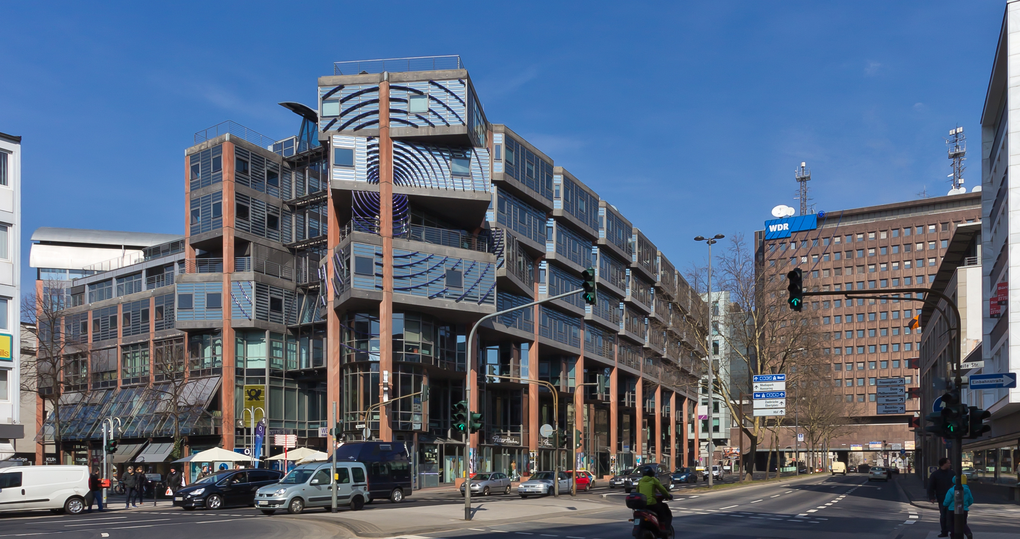 Köln: WDR-Arkaden, WDR-Archivhaus und Nord-Süd-Fahrt